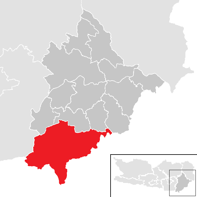 Bezirk Völkermarkt